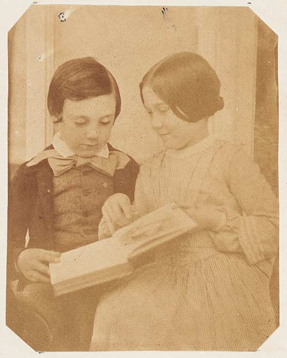 Ffotograffydd/Photographer: Mary Dillwyn (1816-1906) Dyddiad/Date: 1853 Cyfrwng/Medium: Print taken from a collodion negative Cyfeiriad/Reference: viv00060 (pb02376/35) Rhif cofnod / Record no.: 3590001 Rhagor o wybodaeth am Ffotograffiaeth Gynnar Abertawe yn Llyfrgell Genedlaethol Cymru More information about Early Swansea Photographs at the National Library of Wales